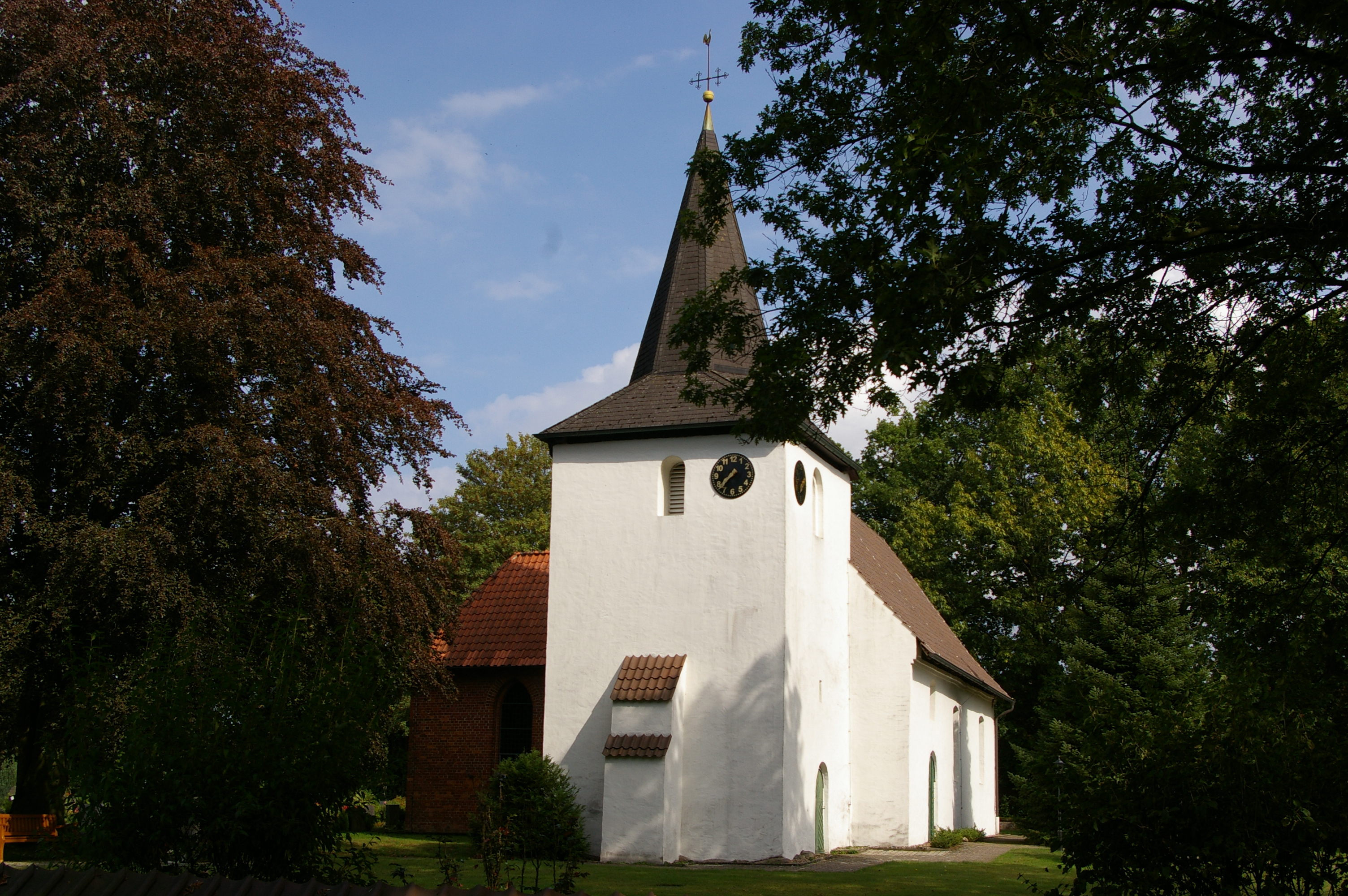 Blick auf den Kirchturm